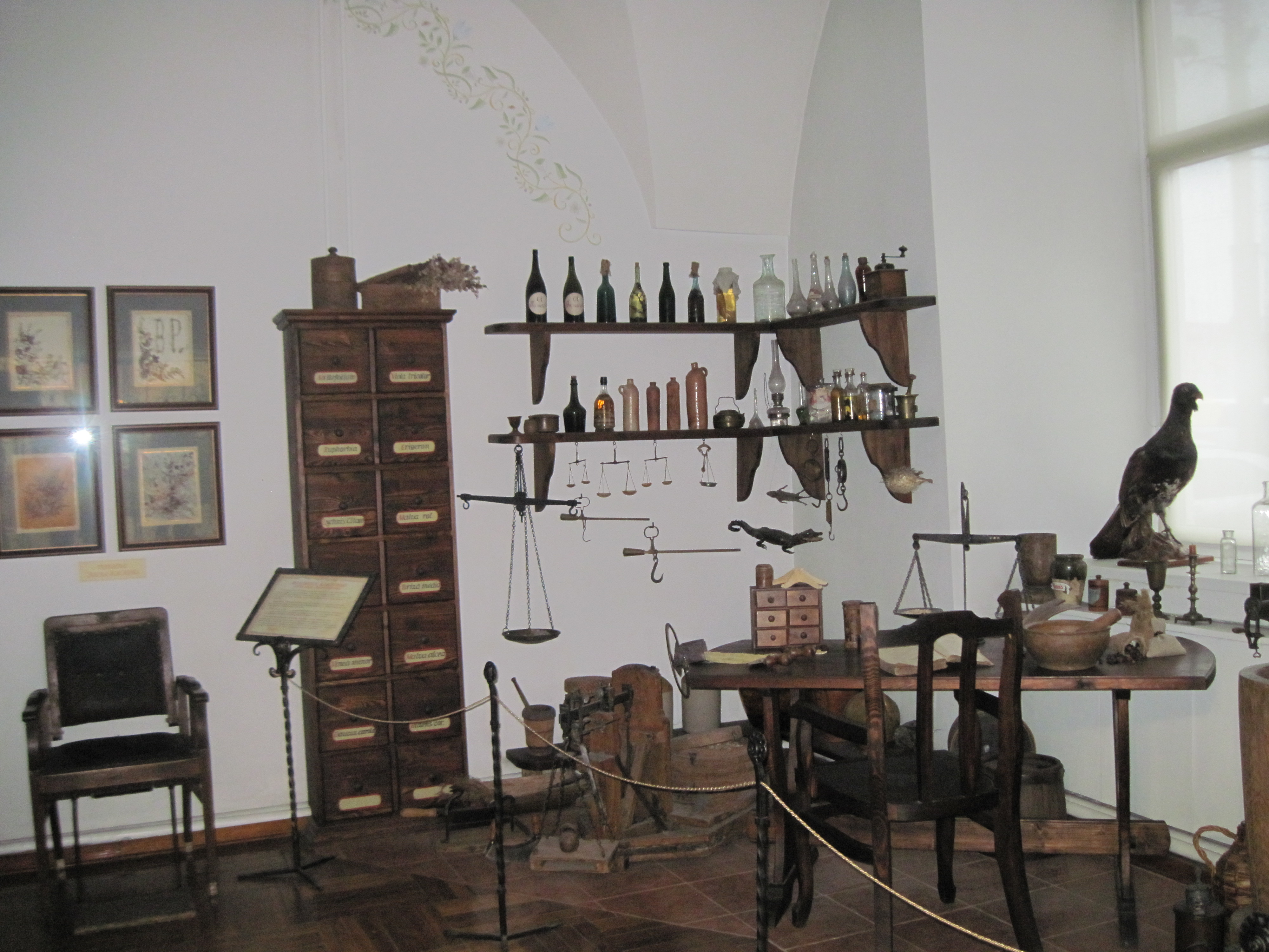 Беларуская (тарашкевіца): Будынак па вул. Замкавая, 5, Гродна